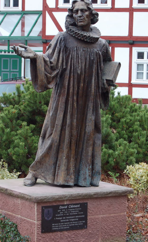 Hofgeismar - Statue von David Clemént